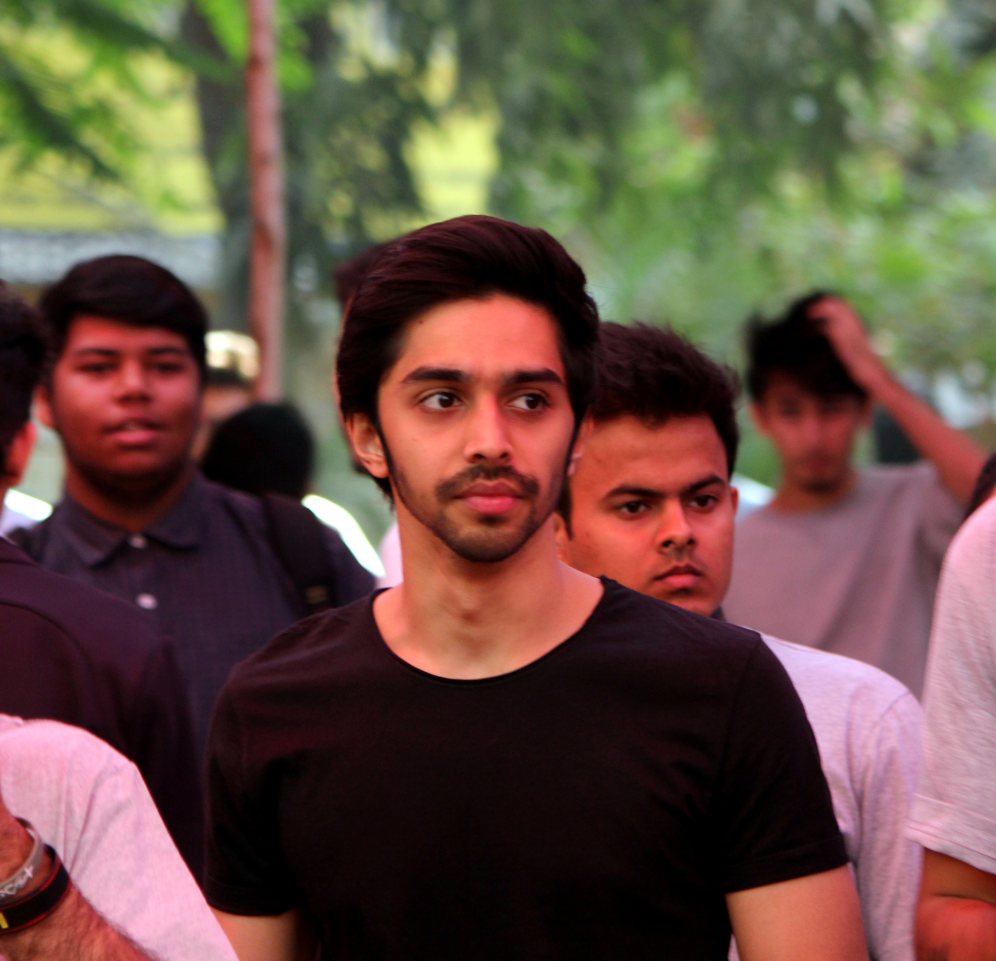 IMG_9024 (1)